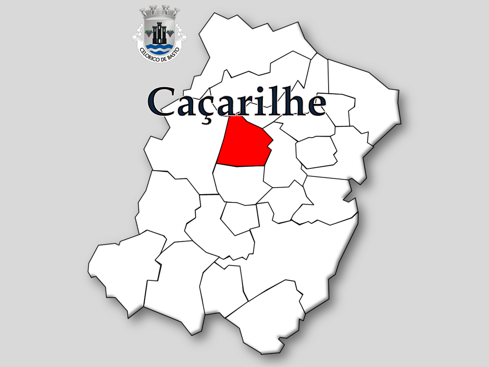 Censos 1864/2011